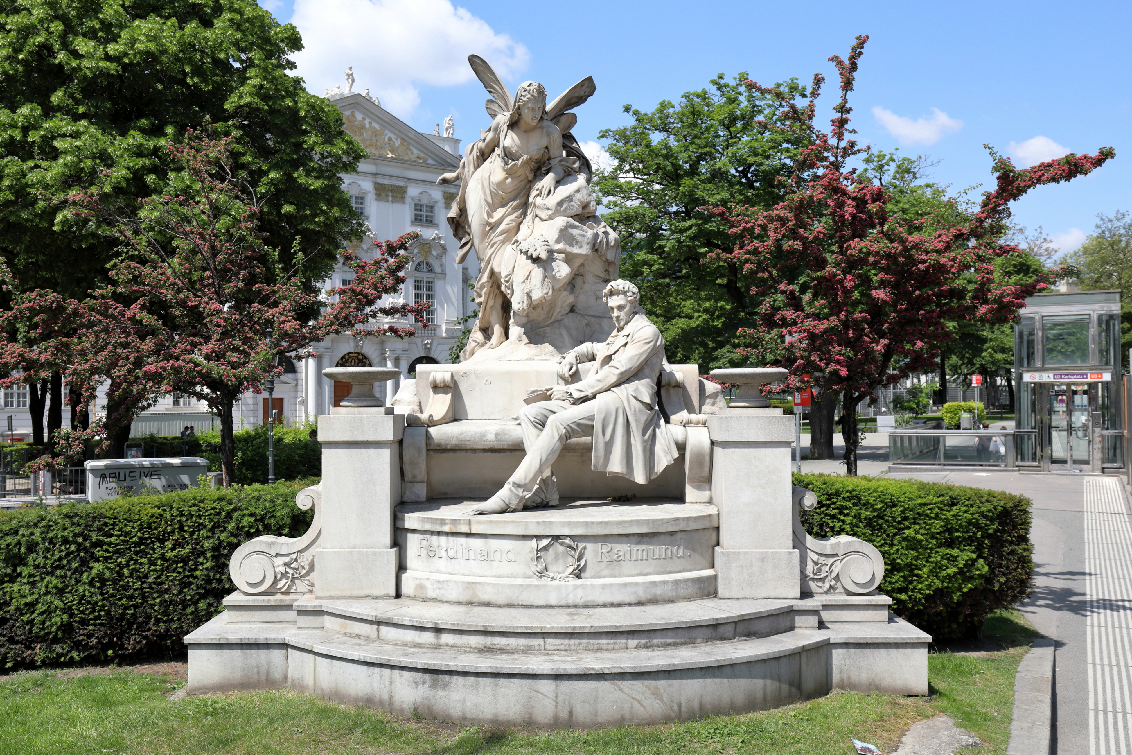 Das Raimund-Denkmal im Weghuber-Park und neben dem Volkstheater im 7. Wiener Gemeindebezirk Neubau.Das Denkmal, ein Werk von dem Bildhauer Franz Vogl, wurde vom Ferdinand-Raimund-Denkmalkomitee gestiftet und am 1. Juni 1898 vor dem Volkstheater enthüllt. 1938 erfolgte die Versetzung in den Weghuber-Park.